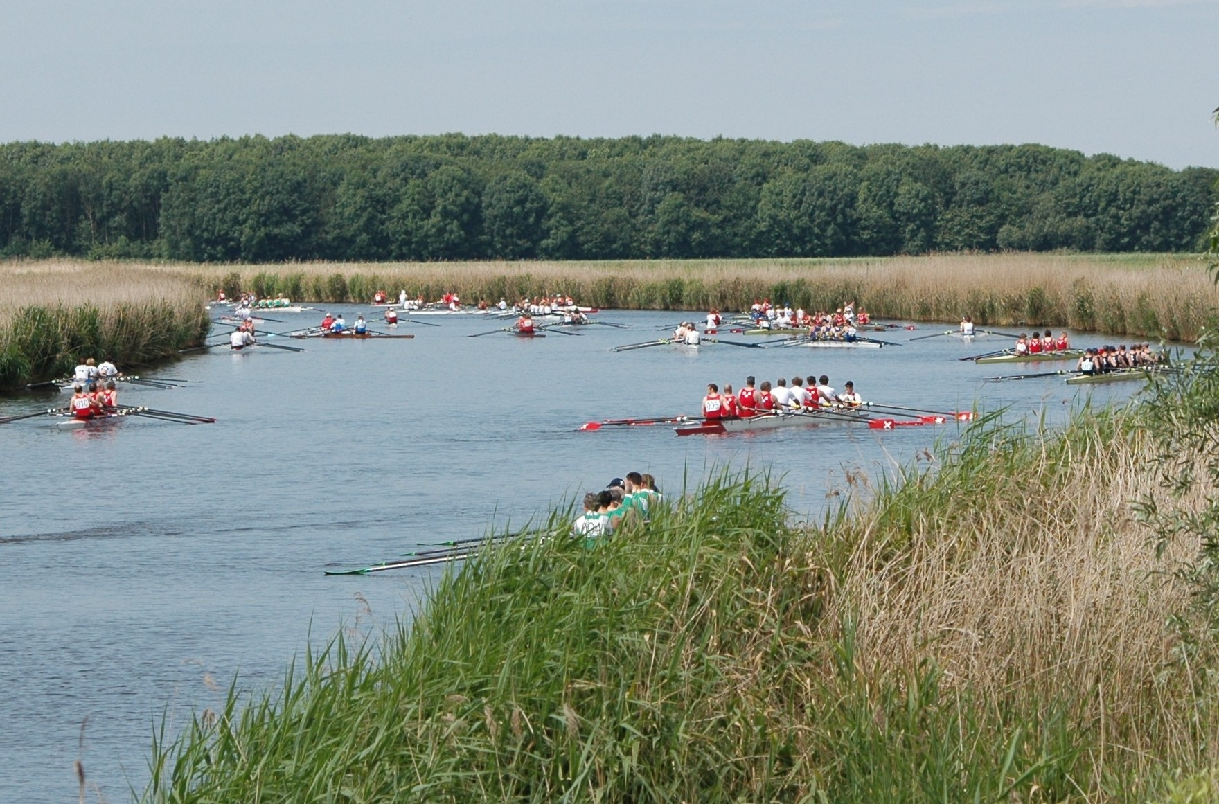 Markregatta 2009 Roeivereniging Breda - Voor de start